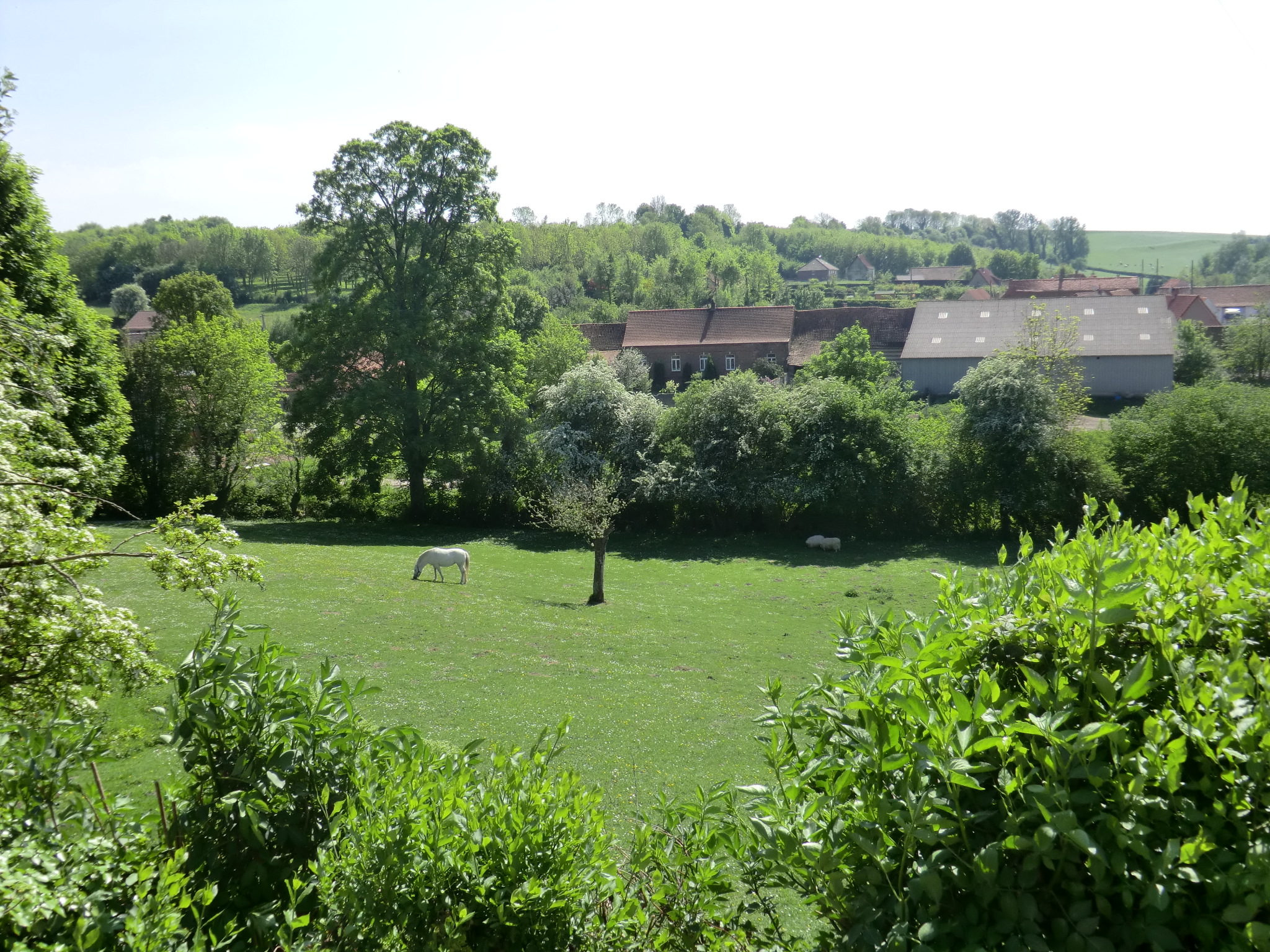 Vue sur une pâture de Remilly-Wirquin, village du Nord-Pas-de-Calais, France. Environnement préservé (territoire classé Parc naturel régional en 2011) avec un cheval qui pâture, la végétation locale (haies), des bâtiments agricoles...